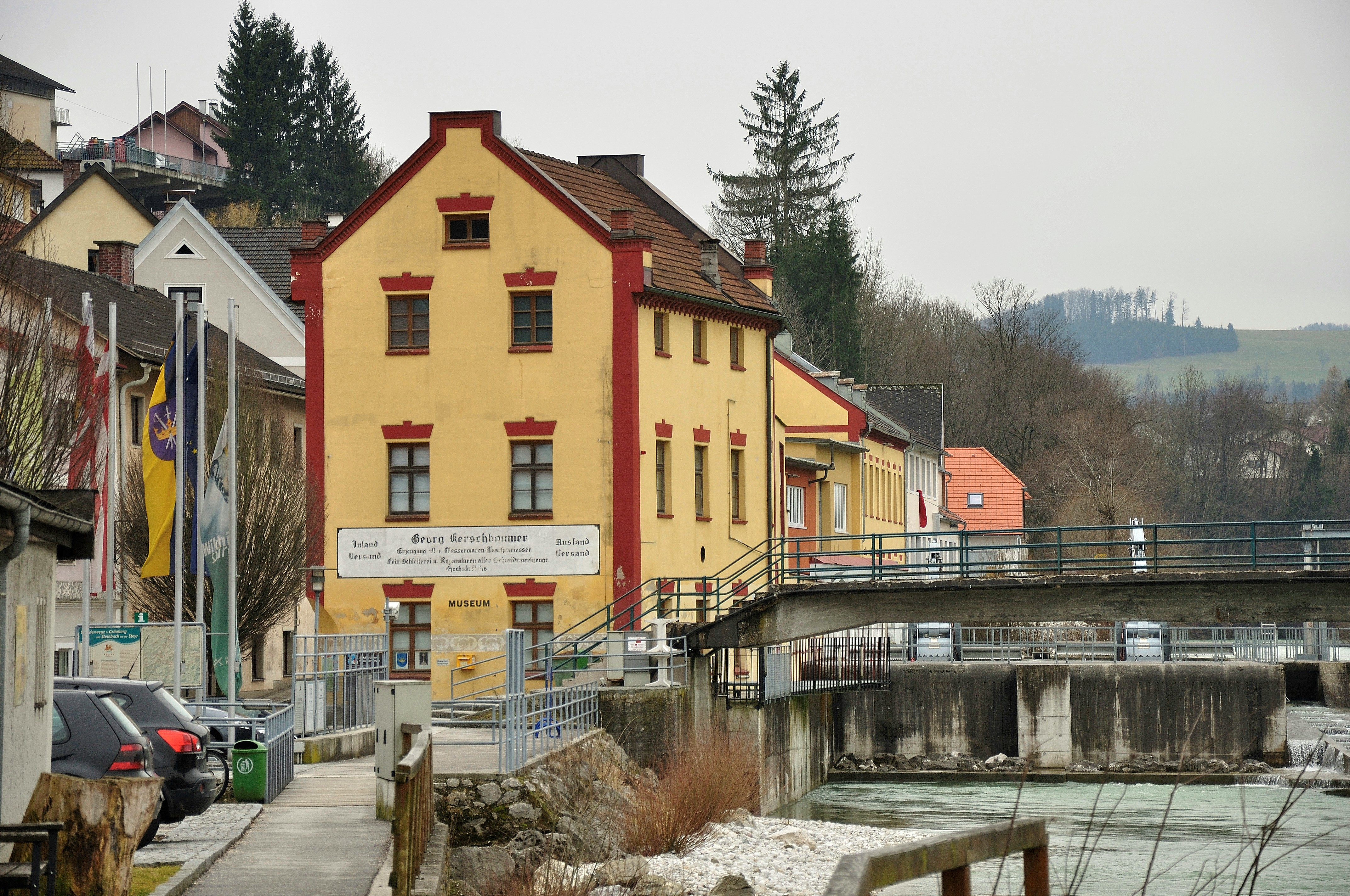 Steinbach an der Steyr. Die ehemalige Innungsschmiede der Steinbacher Messerhersteller war bis 1967 in Betrieb. Seit 1998 ist hier das Messerermuseum untergebracht.